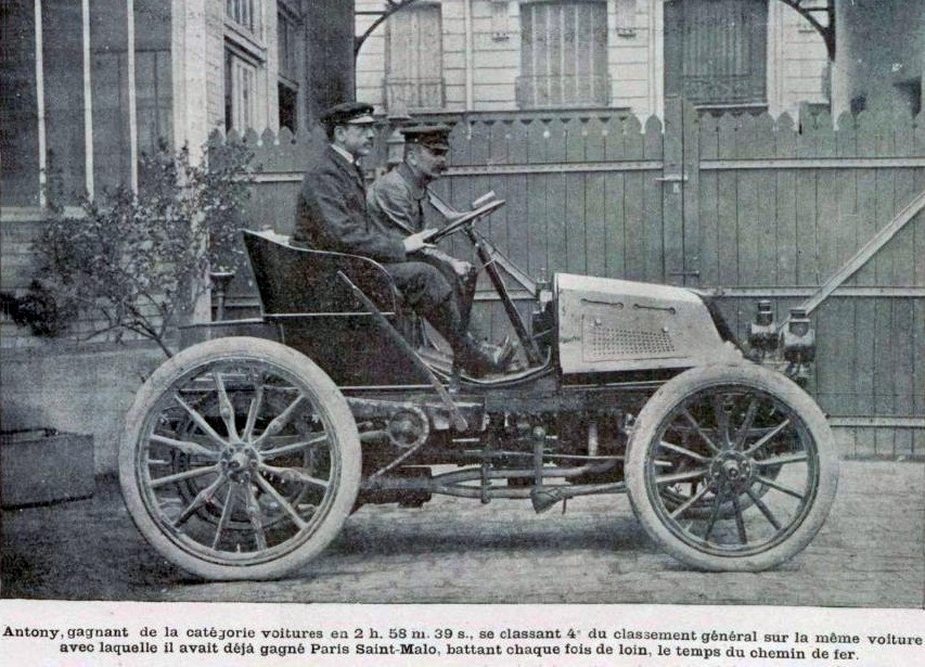 Antony, vainqueur catégorie automobile de Paris-Trouville en 1899 (La Vie au Grand Air 10 septembre 1899)